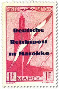 Британская подделка авиапочтовой марки Французского Марокко, 1 франк, 1939 год, с фальшивой надпечаткой "Германская государственная почта в Марокко", 1942 год.